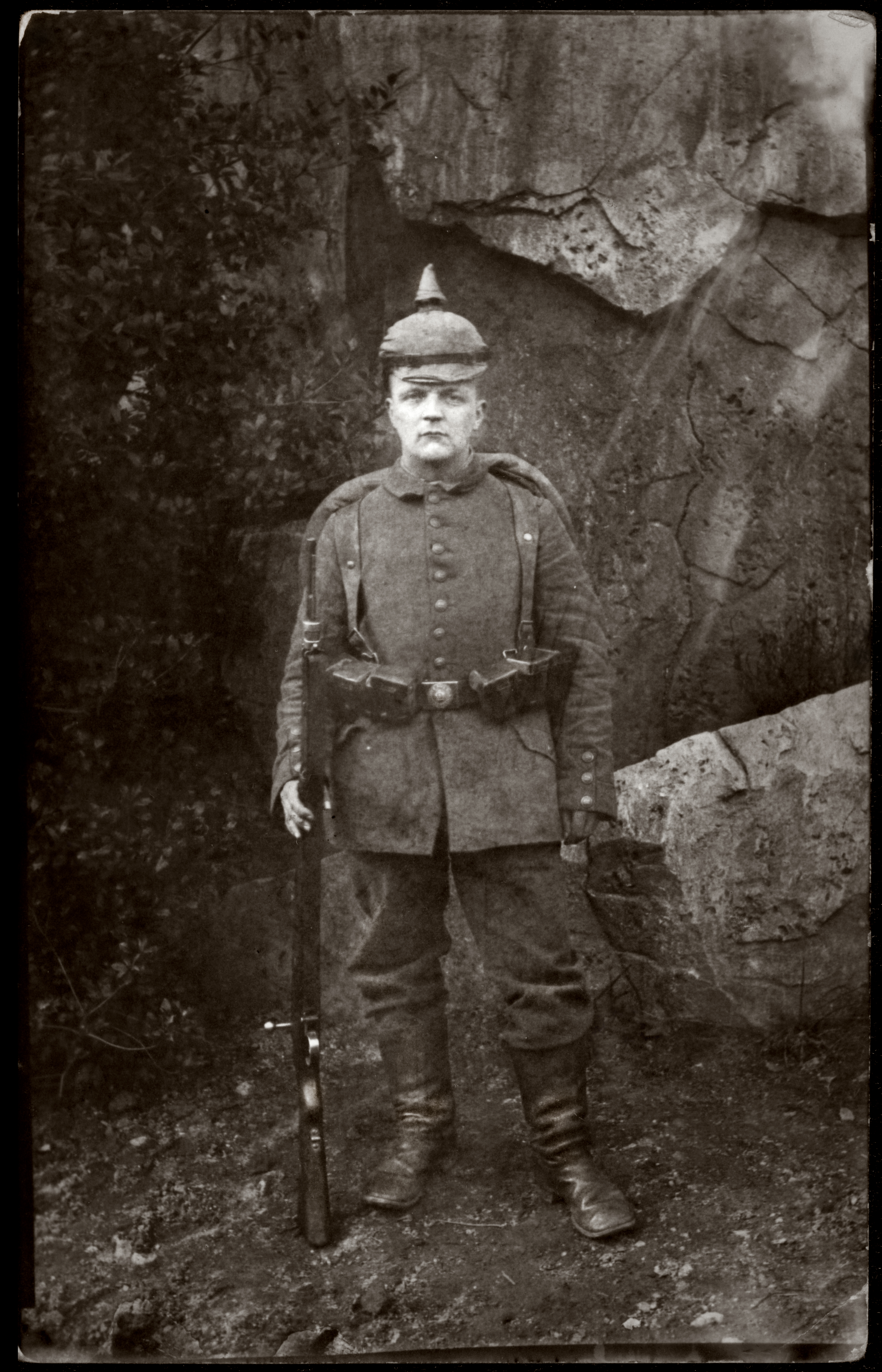 Duitse schrijver en journalist Heinrich Wandt als soldaat tijdens WO I in Gent (België).